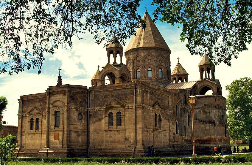 Эчмиадзинский Кафедральный Собор, Армения. Вид из парка.